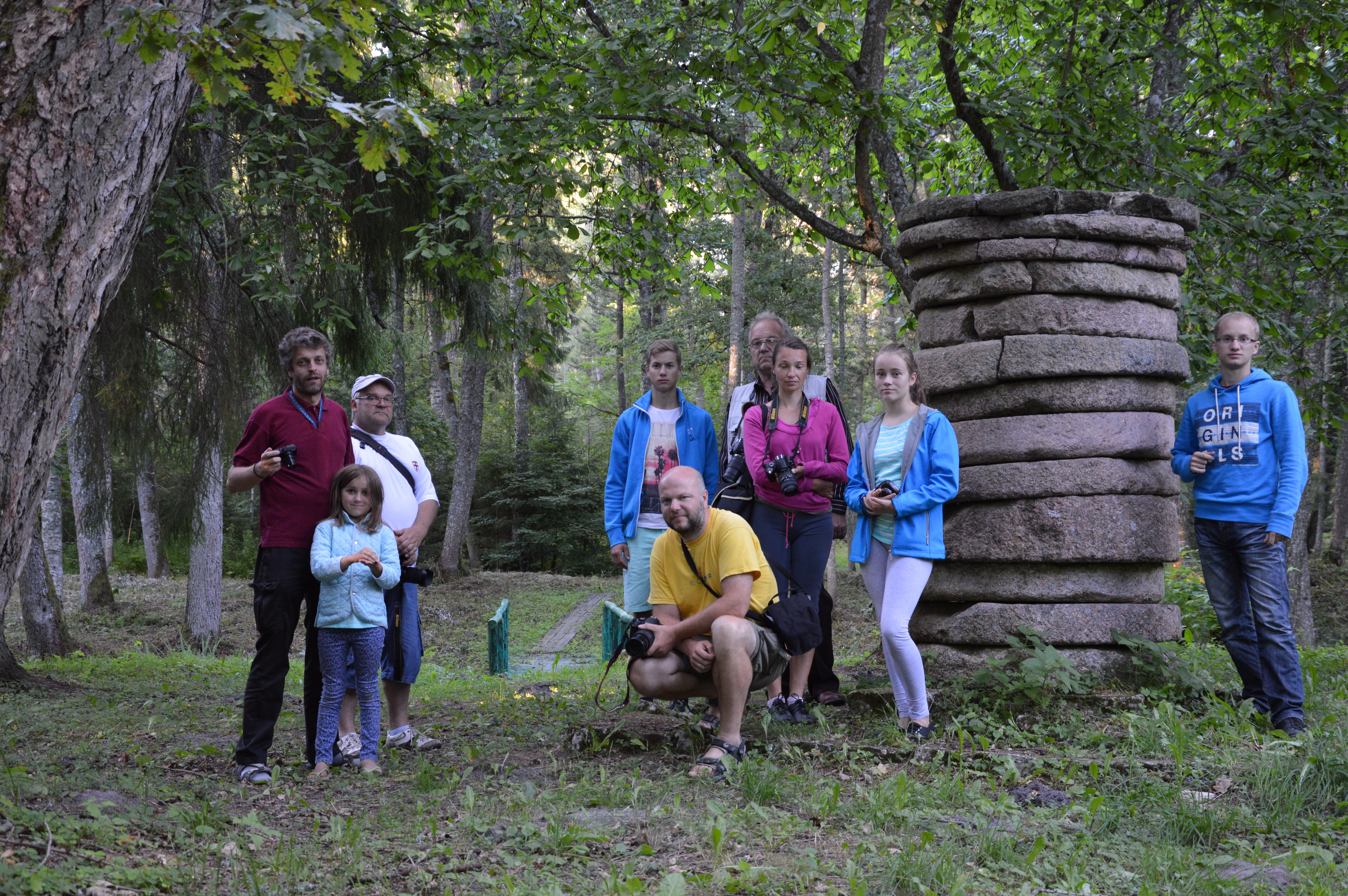 Vana-Vigala pildiretke osalised Vana-Vigala Hirvepargis Lisette saarel.